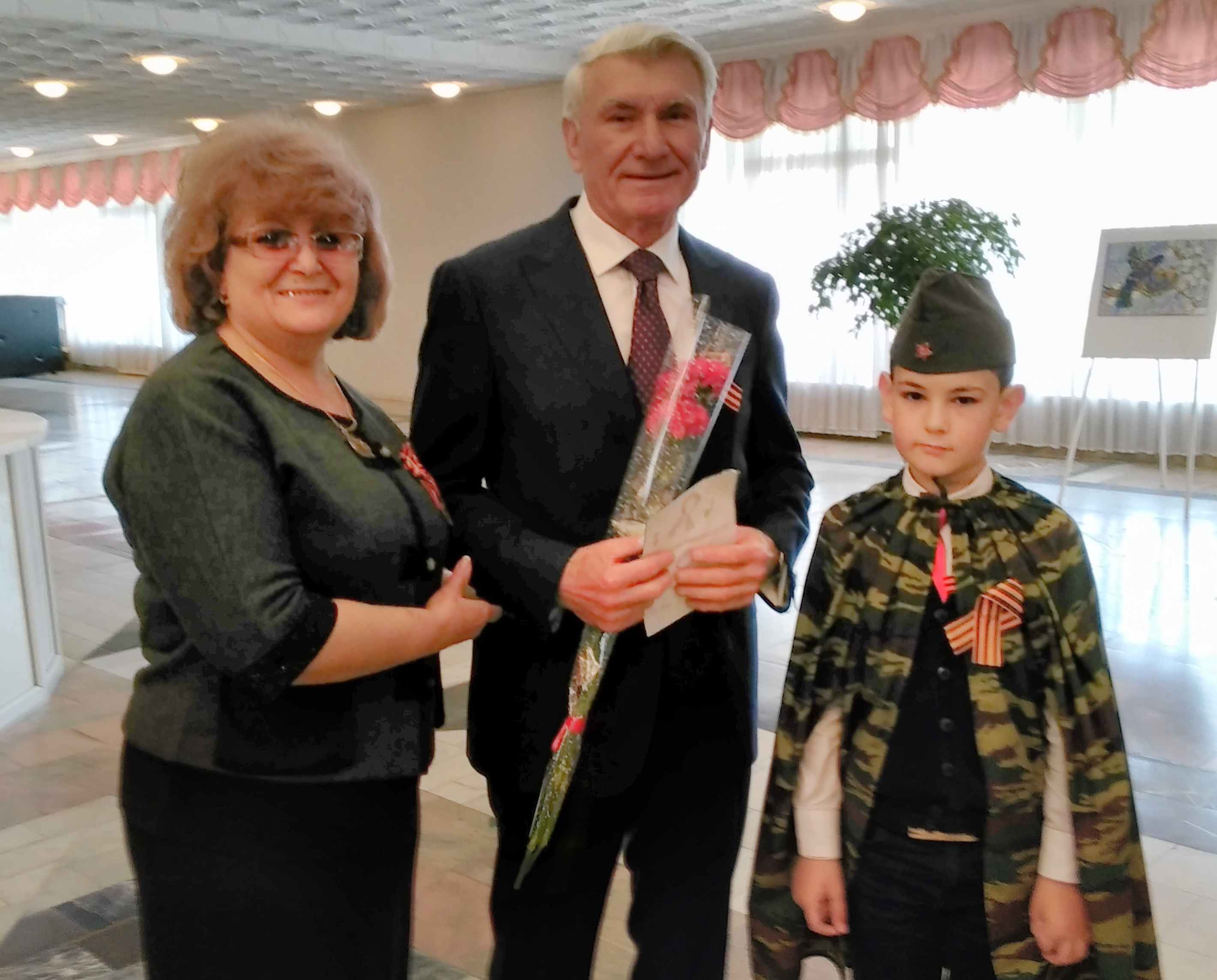 А. А. Джаримов на торжествах в честь Дня Победы. Майкоп 2016.